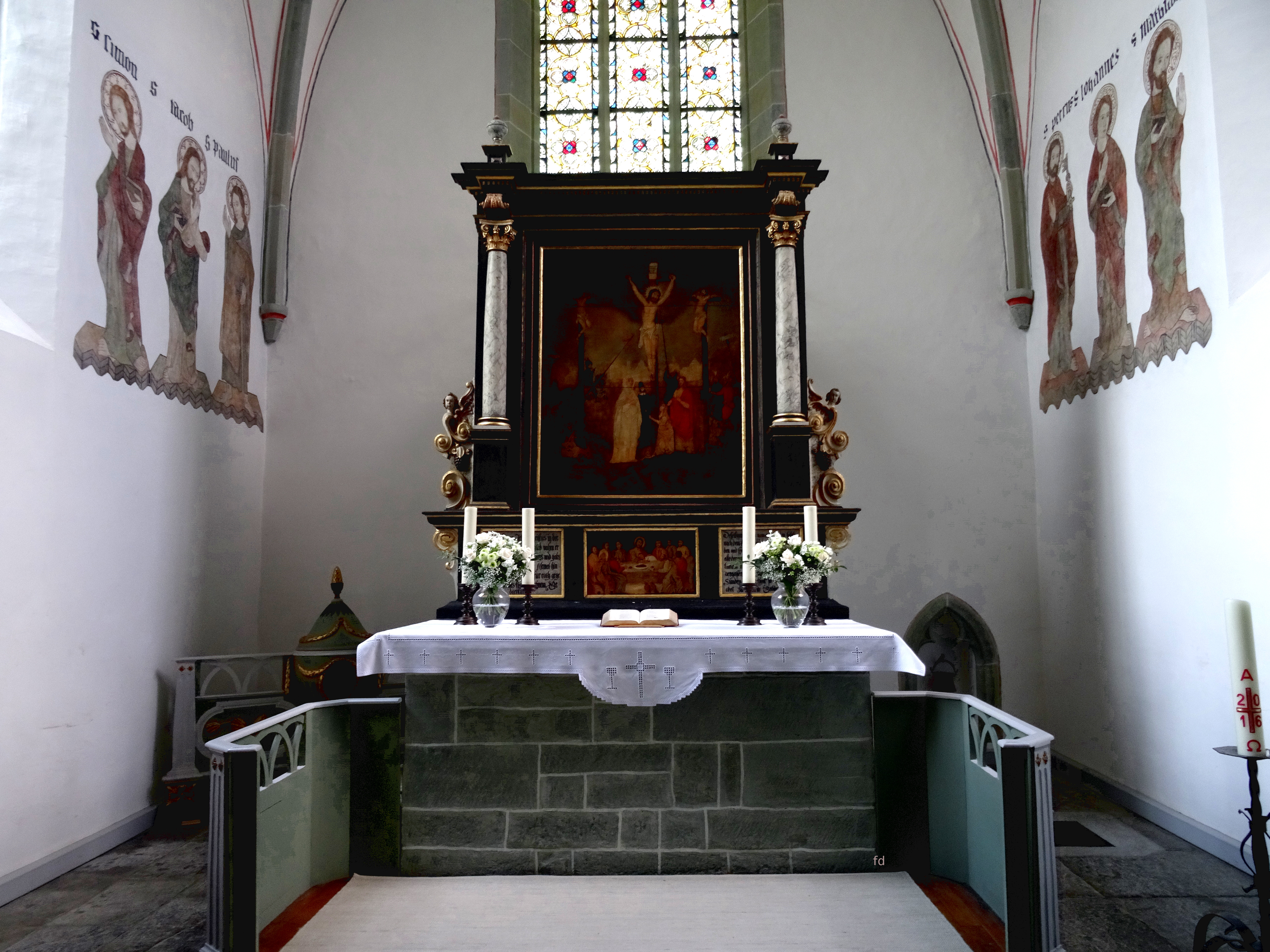 Kirche Bad Sassendorf Altar.